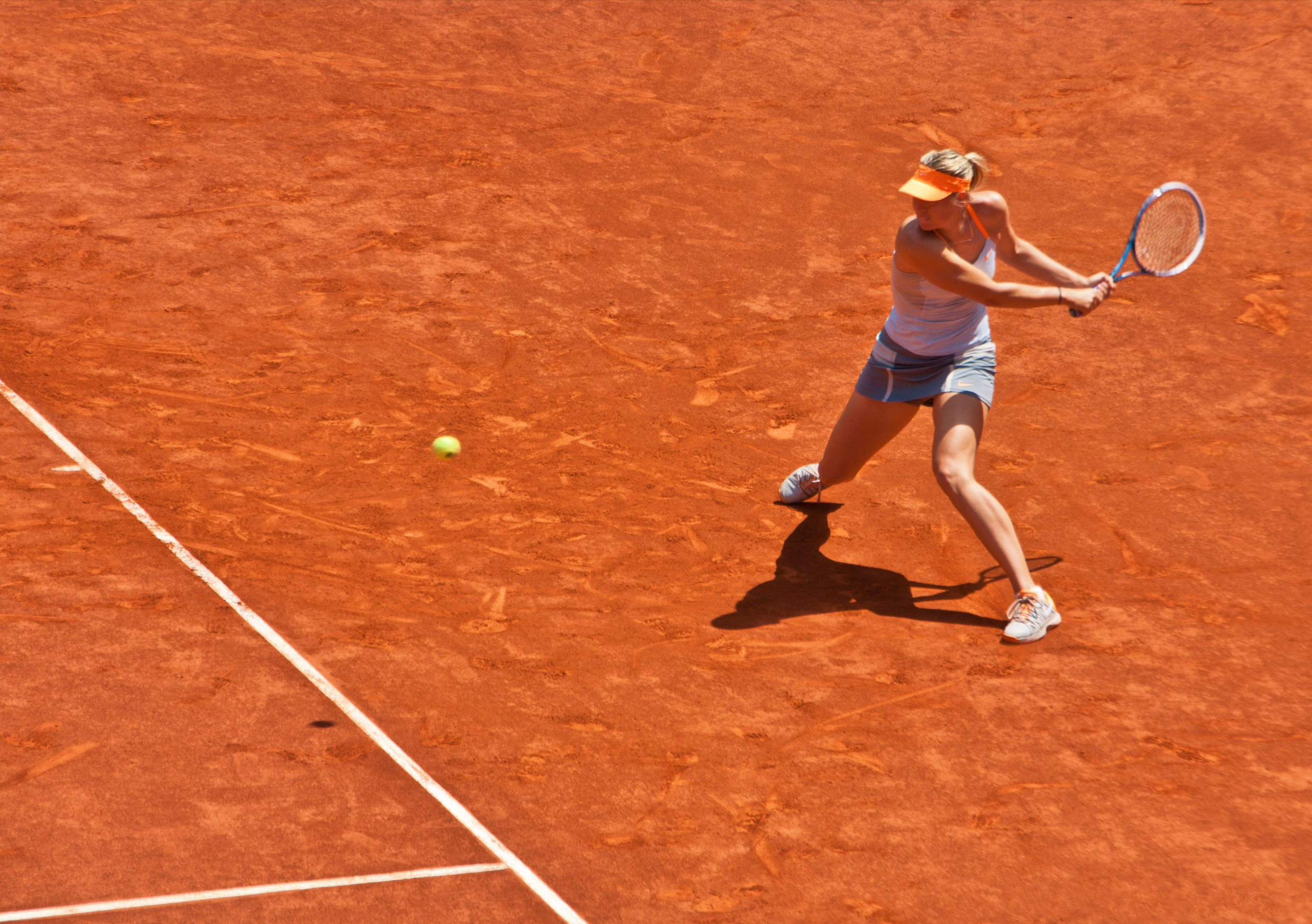 2013 Mutua Madrid Open